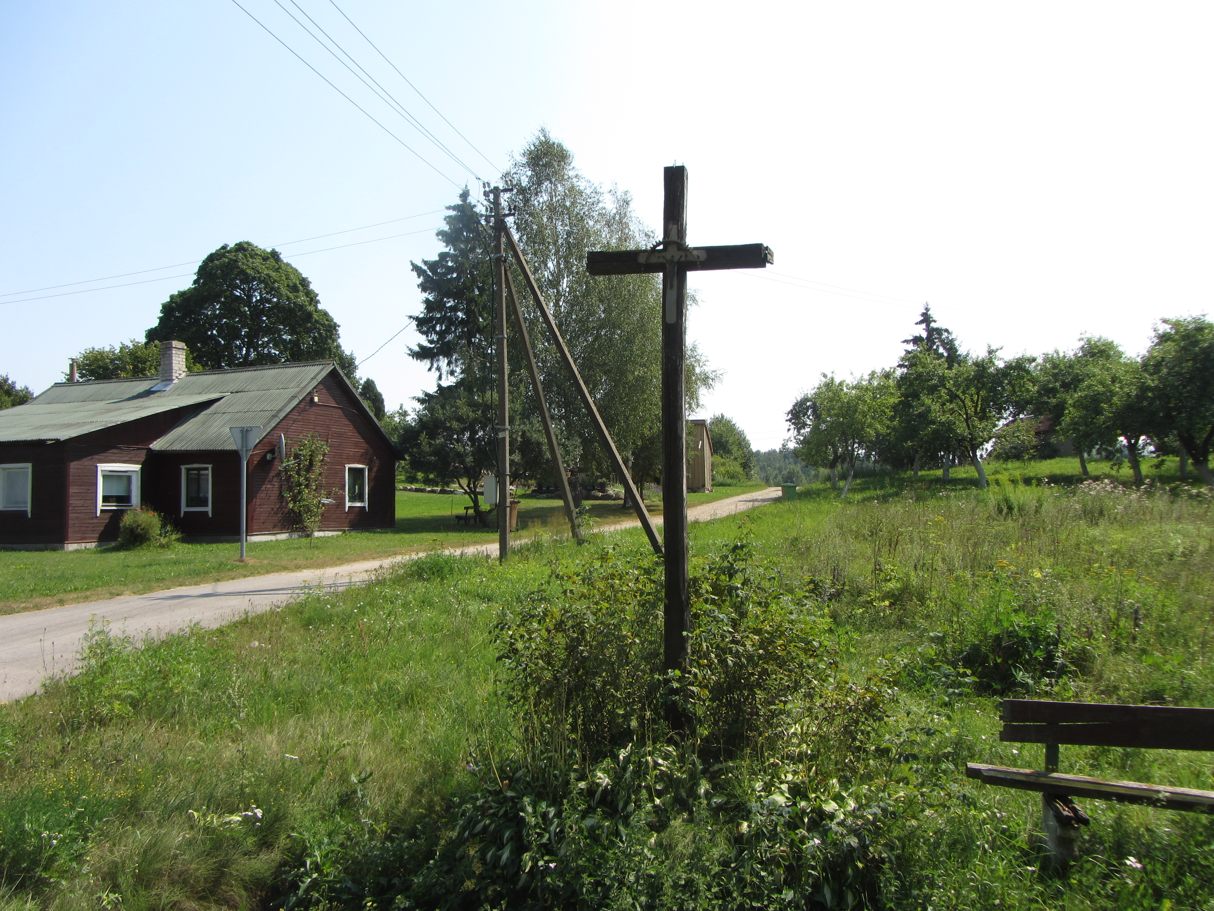 Gaukeliškės 15100, Lithuania